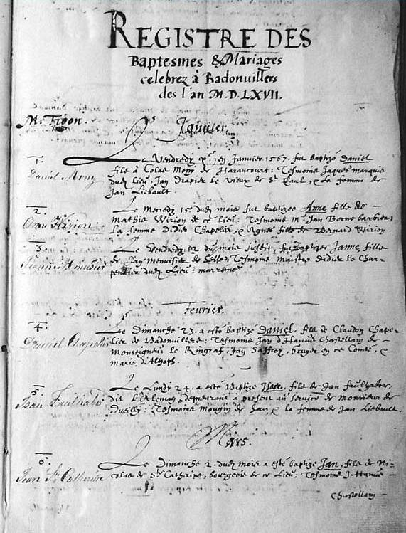 Église réformée de Badonviller : Première page du registre des baptêmes (1567-1624)